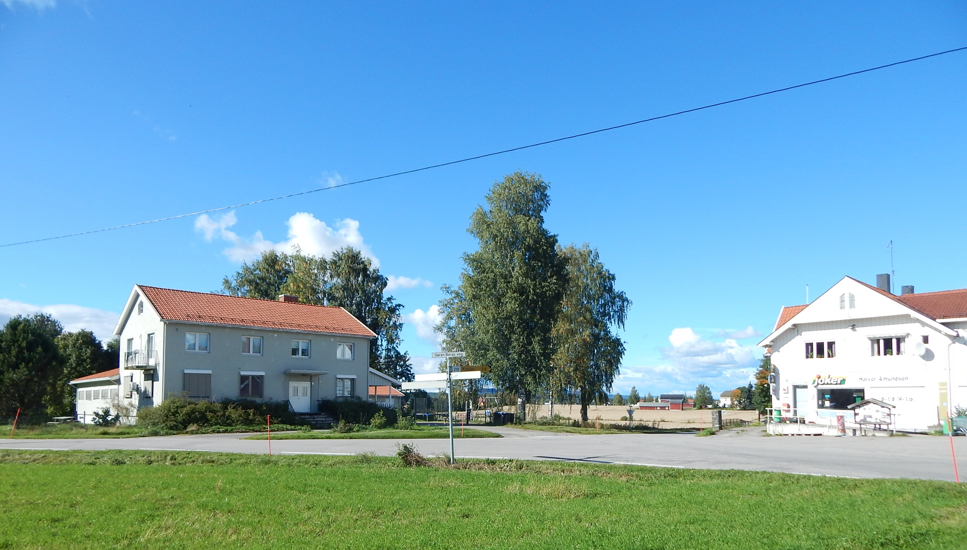 Bygdesenteret i Hof, Åsnes